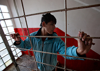 Моніторинг місць несвободи